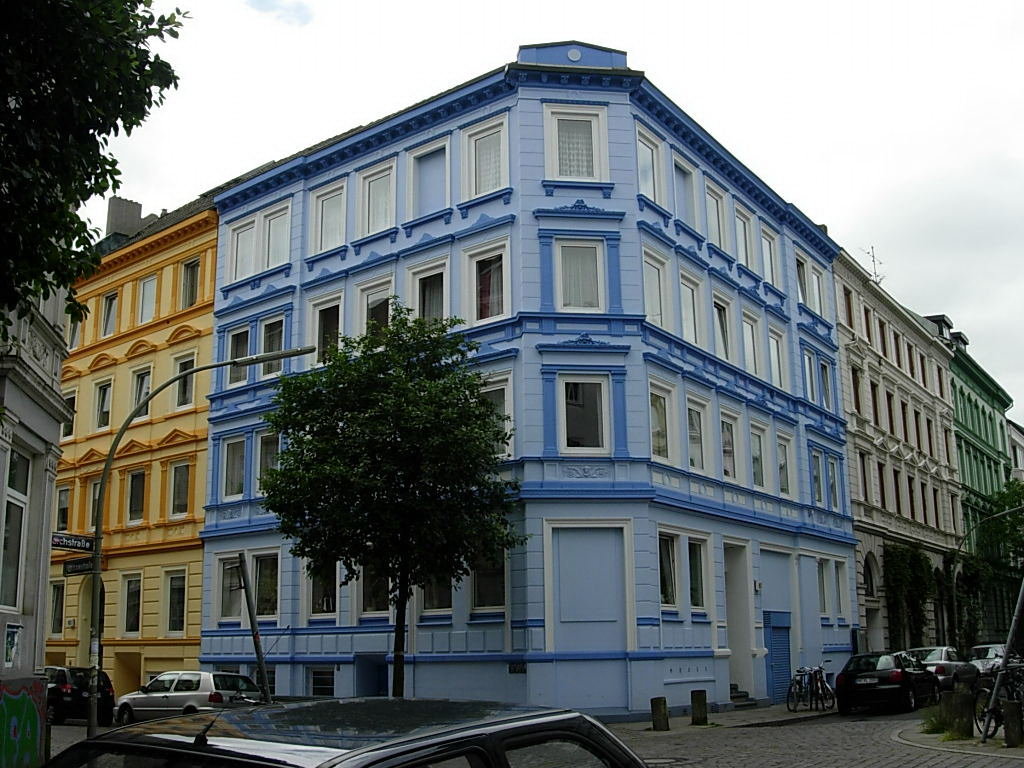 Straßenecke Virchowstraße / Esmarchstraße mit einem markant blau gestrichenem Wohngebäude.